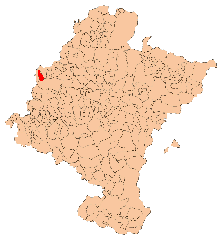 Olazti Nafarroako mapan kokatua.